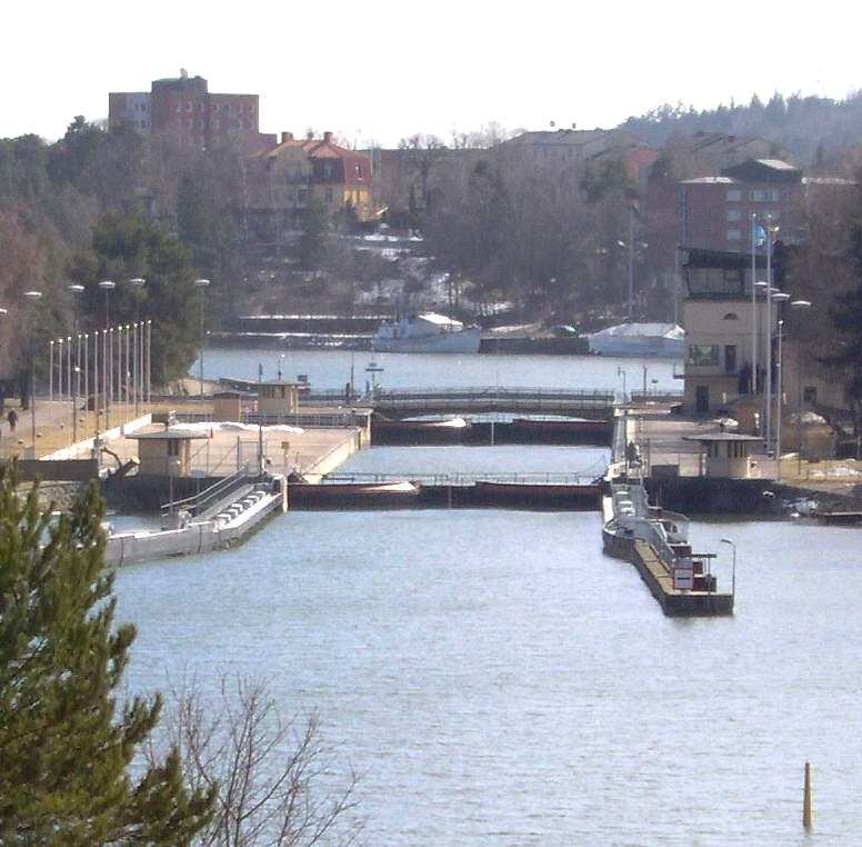 Södertälje sluss från Mälaren. De gångbara slussporten, Slussbron och Yttre Maren i Östersjön. Södertälje lock from the lake Mälaren. The walkable lockgate, the Lockbridge and outher Maren in the Baltic sea.